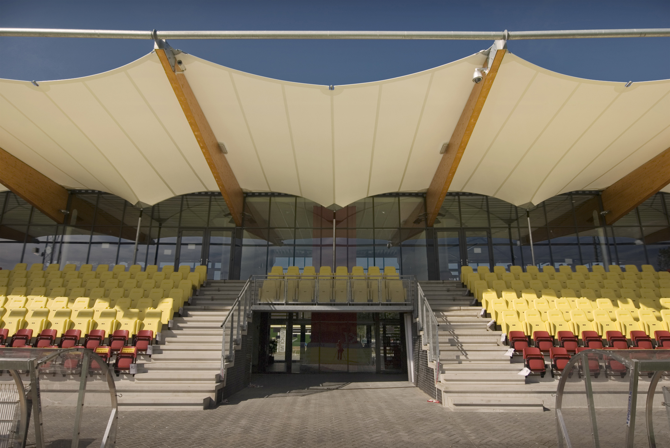 Tata Steel Stadium